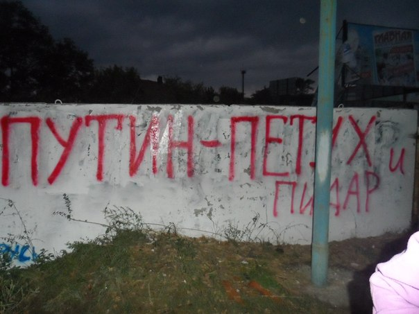 Мелитополь